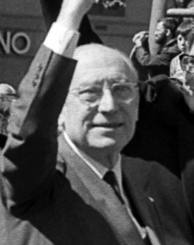 Enrique Tierno Galván y Ramón Tamames asisten a la manifestación del 1º de Mayo, de 1979, en Madrid.